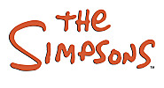 Logo dos Simpsons na vigésima temporada.